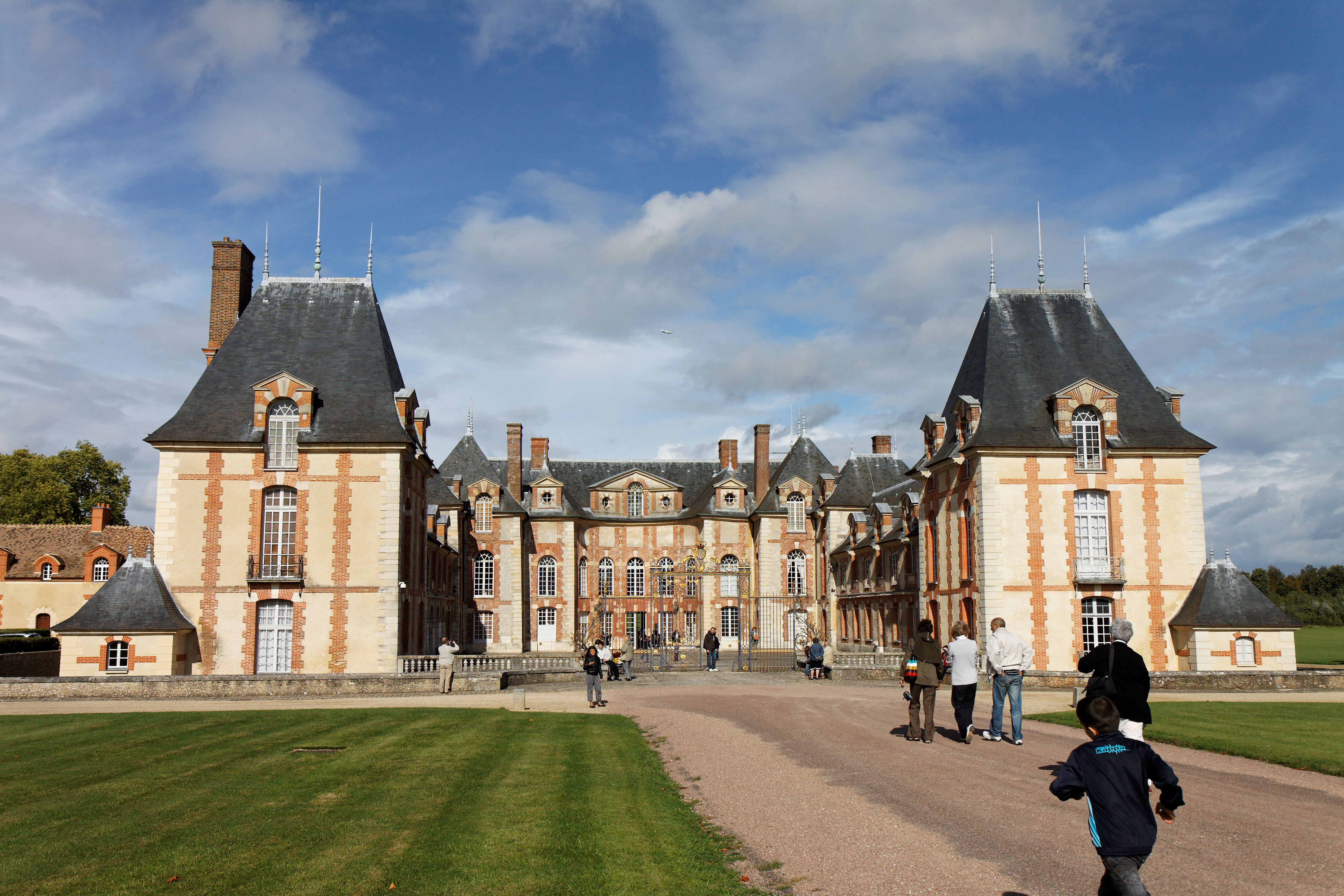 Le château de Grosbois à Boissy-Saint-Léger dans le Val-de-Marne. .